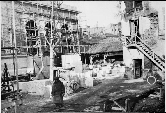 Fonds Trutat - Photographie ancienne Cote : BIBLC33 Localisation : Fonds ancien (S 30) Original non communicable Titre : Echafaudages sur le chantier de construction de la Bibliothèque municipale de Toulouse, rue de Périgord, 1932 Auteur : Trutat, Eugène Rôle de l’auteur : Photographe Lieu de création : Toulouse (Haute-Garonne) Date de création : 1932 Mot(s)-clé(s) : -- Extérieur -- Chantier -- Construction -- Echafaudage -- Bibliothèque -- Ouvrier -- Bloc (roche) -- Pierre -- Bibliothèque municipale de Toulouse -- Toulouse (Haute-Garonne) -- Haute-Garonne (Midi-Pyrénées) -- France -- 20e siècle, 2e quart Médium : Photographies -- Noir et blanc -- Scènes Bibliothèque de Toulouse. Domaine public